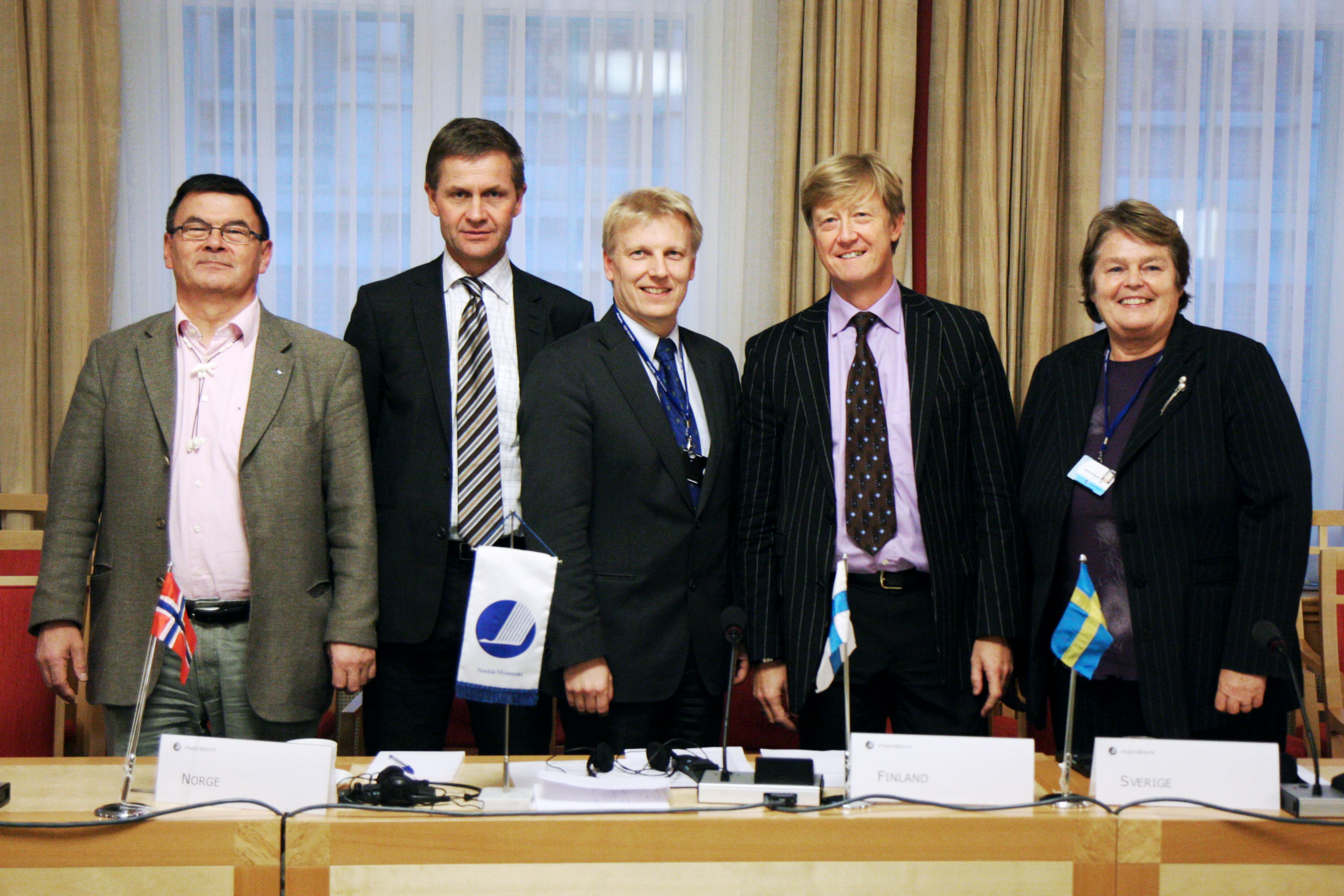 Nordiska Miljöministrar vid Nordiska Rådets session i Oslo. 2007-10-31. Foto: Magnus Fröderberg/norden.org